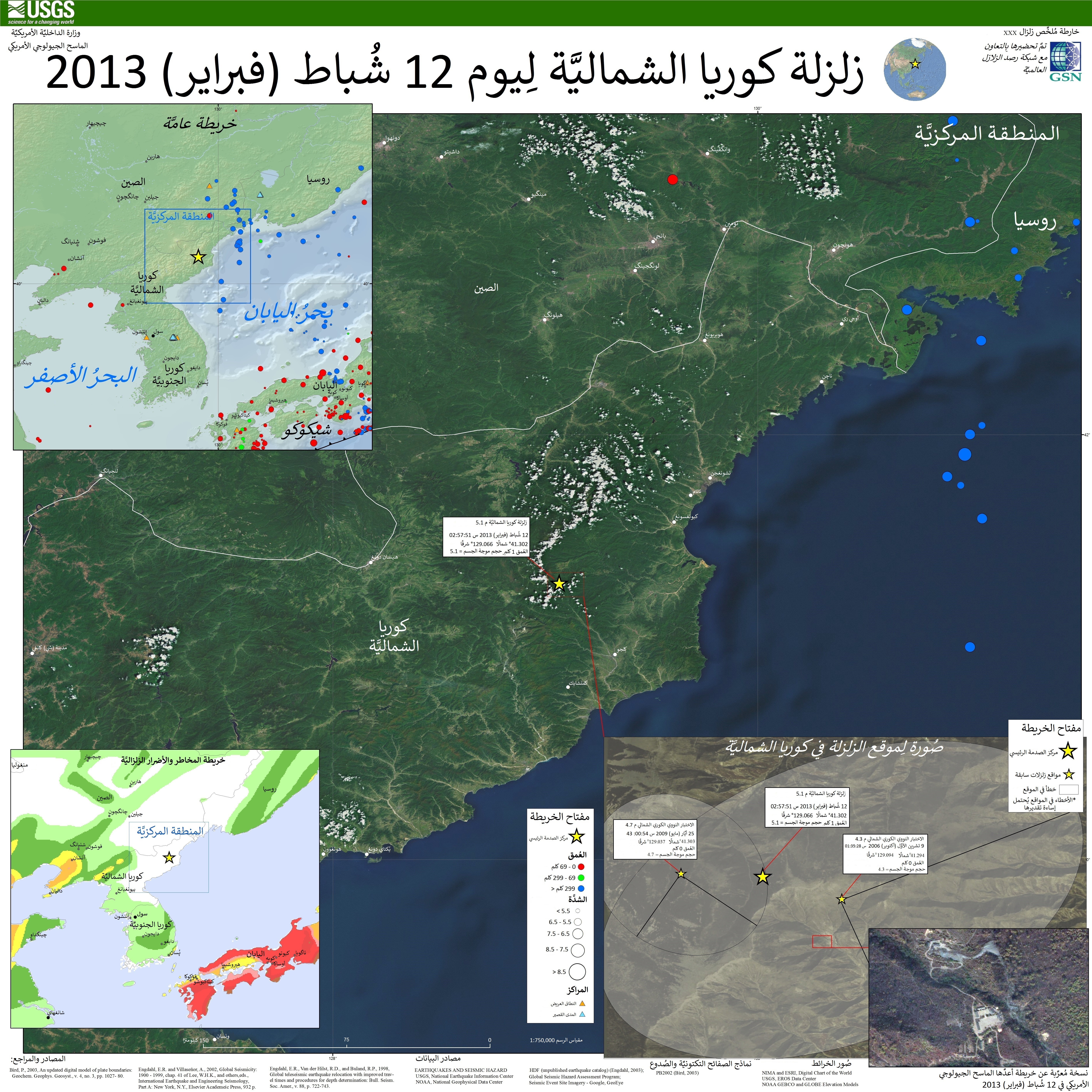 نسخة مُعرَّبة عن مُلصق معلوماتي صادر عن الماسح الجُيُولوجي الأمريكي يُظهر شدَّة الاختبار النووي الكوري الشمالي لِسنة 2013م.